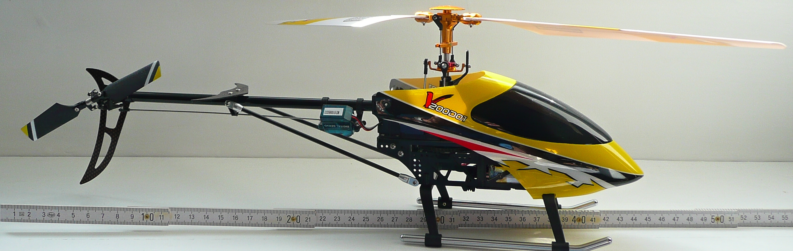 Walkera V200D01 Modellhubschrauber